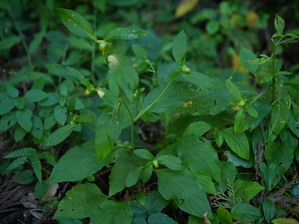 Carpesium divaricatum：ガンクビソウ 2014/09/27 和歌山県田辺市：Tanabe City. Wakayama Pref. Japan